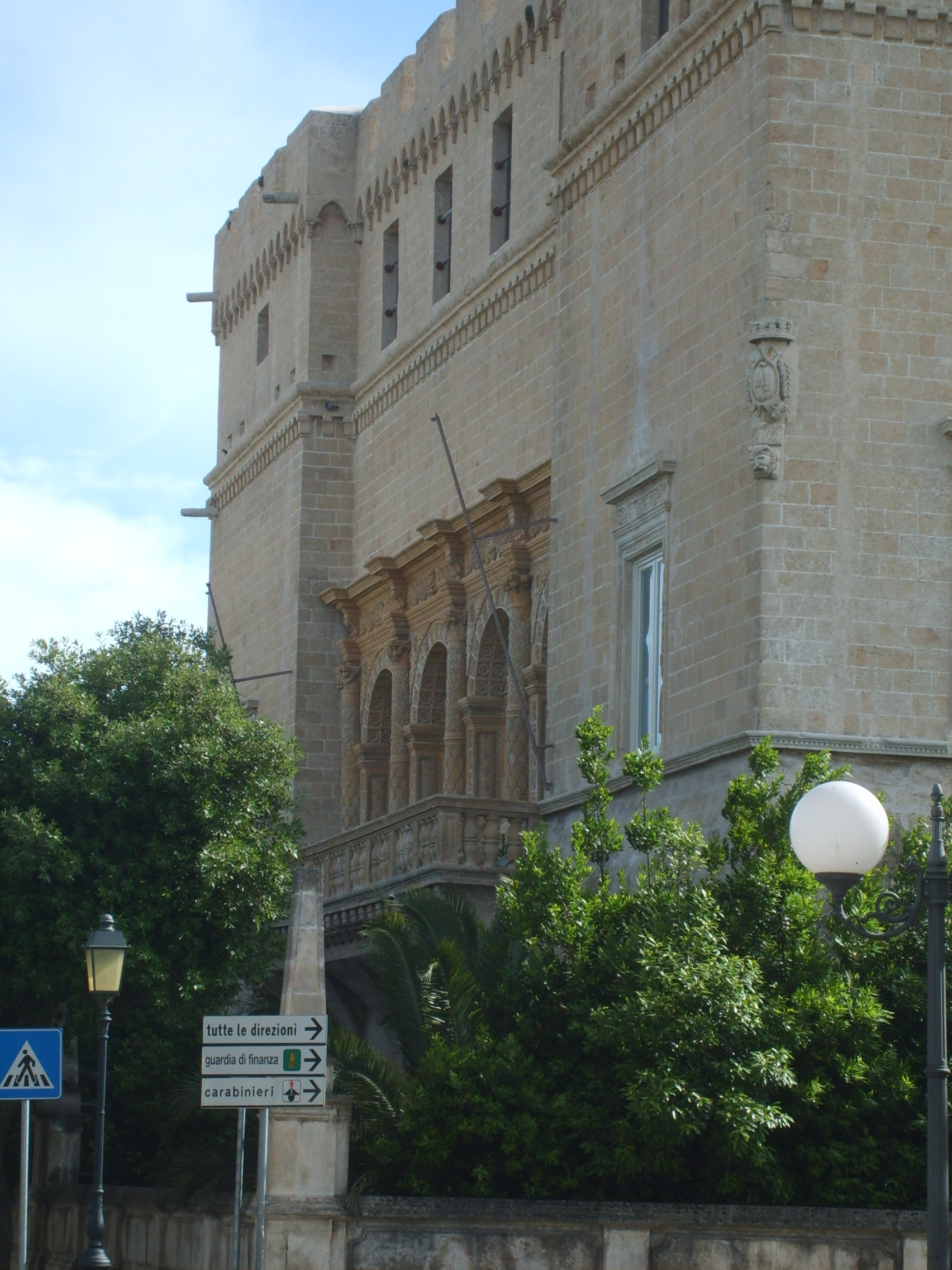 Scorcio del loggiato del Castello Imperiali, a Francavilla Fontana.